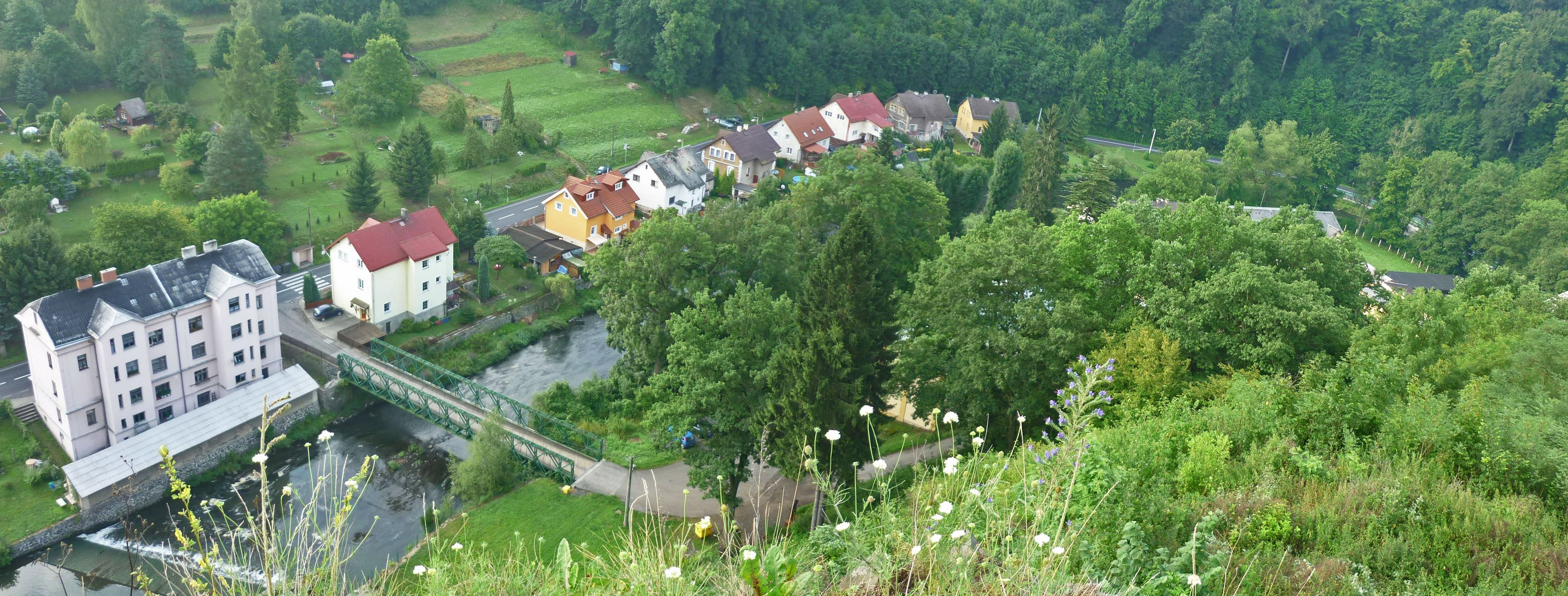 Blick von der Burgruine Scharfenstein (Hrad Ostrý) bei Bensen (Benešov nad Ploučnicí) ins Polzental auf Franzenthal-Ulgersdorf